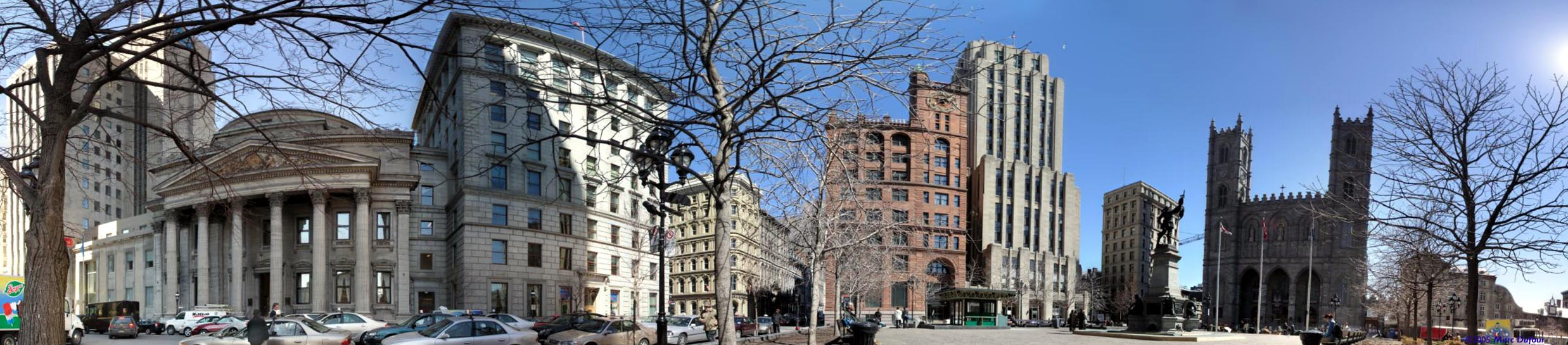 Vue panoramique de la place d?Armes à Montréal. L?édifice classique à gauche est la Banque de Montréal; l?immeuble rouge est le premier gratte-ciel de Montréal, et à droite, l?église Notre-Dame.